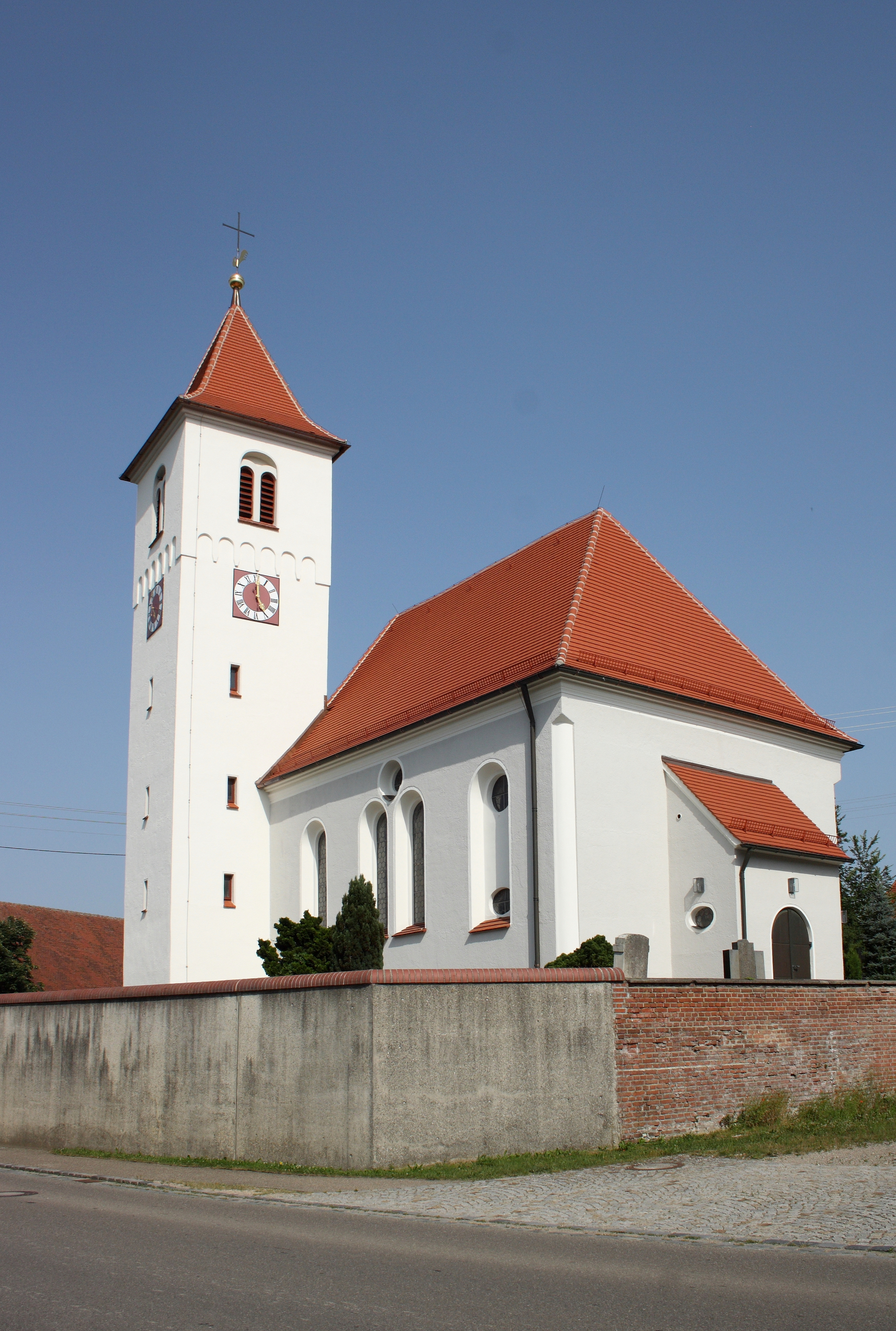 Katholische Pfarrkirche St. Blasius in Oxenbronn, einem Stadtteil von Ichenhausen im Landkreis Günzburg (Bayern), Turm aus dem 12. Jahrhundert, 1768/69 durch Joseph Dosenberger d.J. umgestaltet